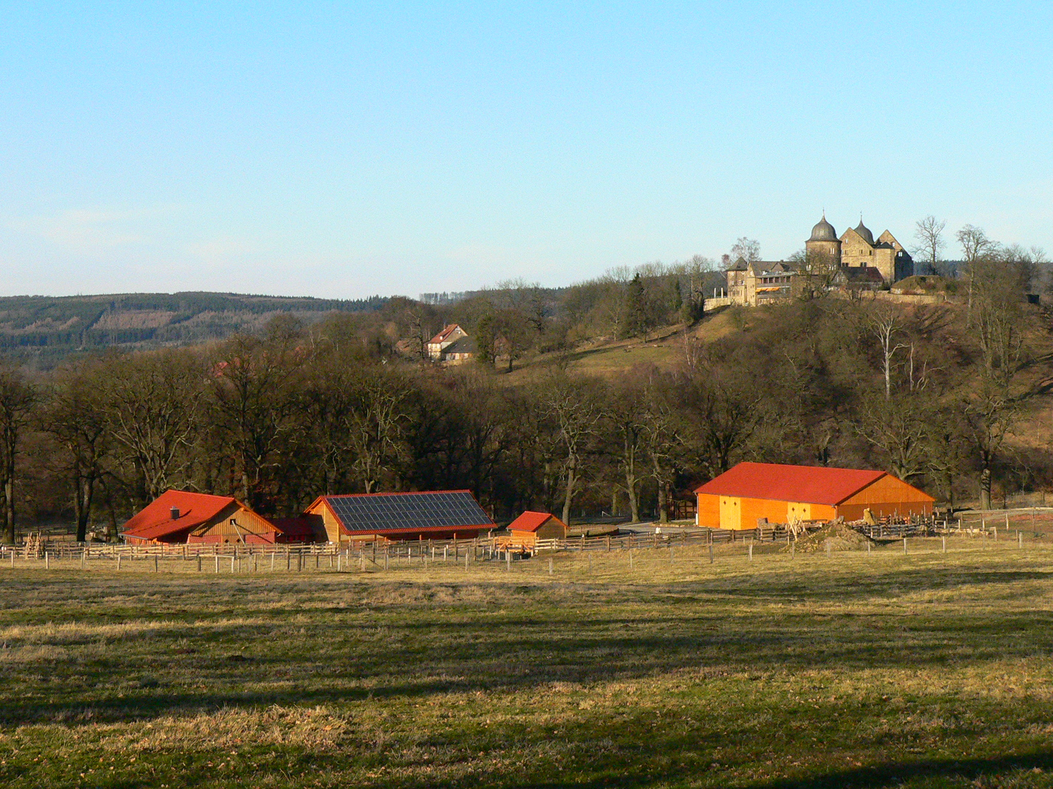 Im Tierpark Sababurg im Reinhardswald (Hessen), "Pickers Hof" (Schulbauernhof)